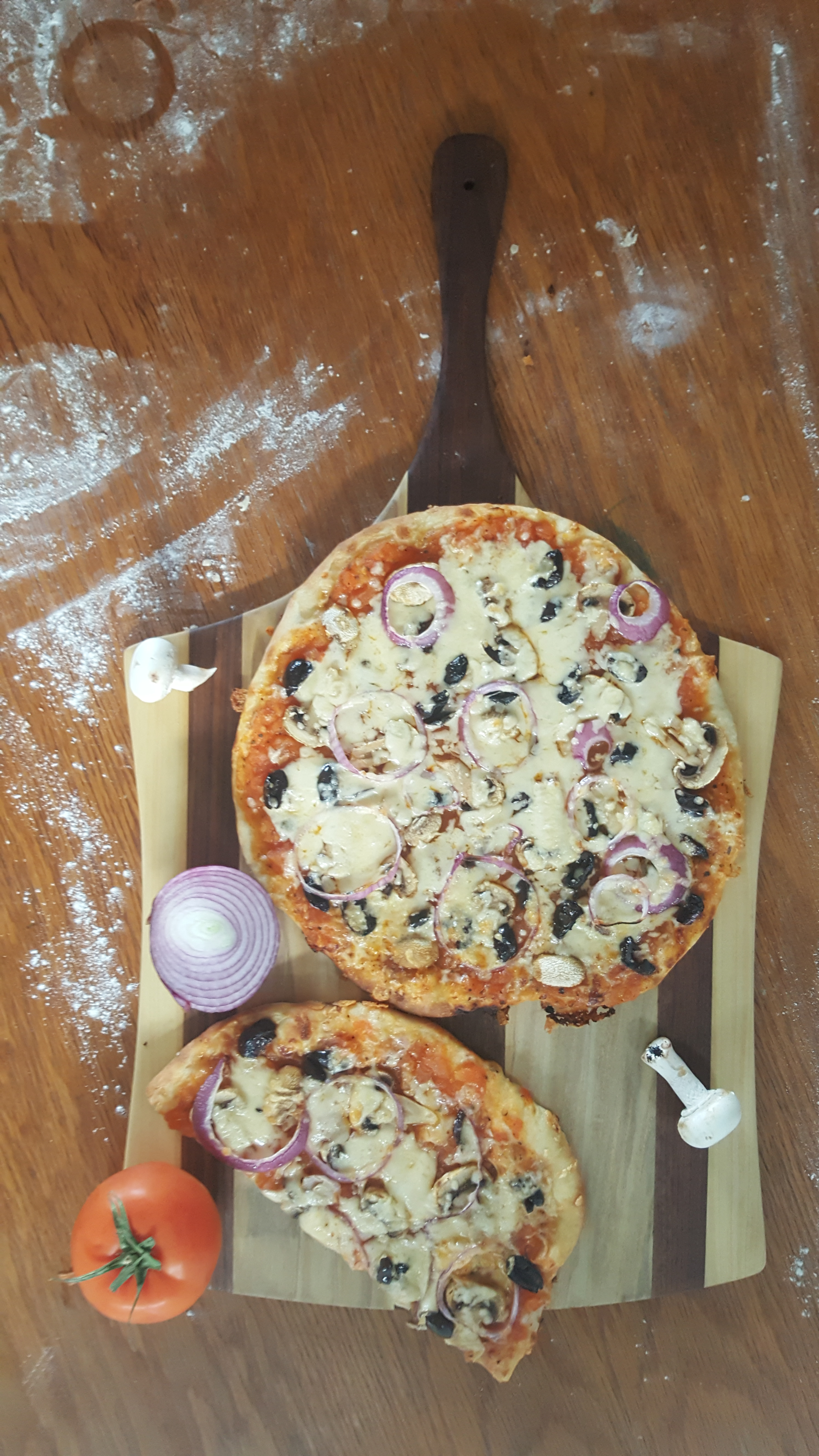 פיצה מבצק פשוט, לאחר אפיה קצרה